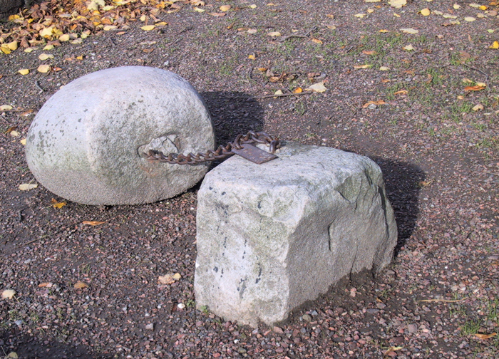 Le gal de Gauchin le gal